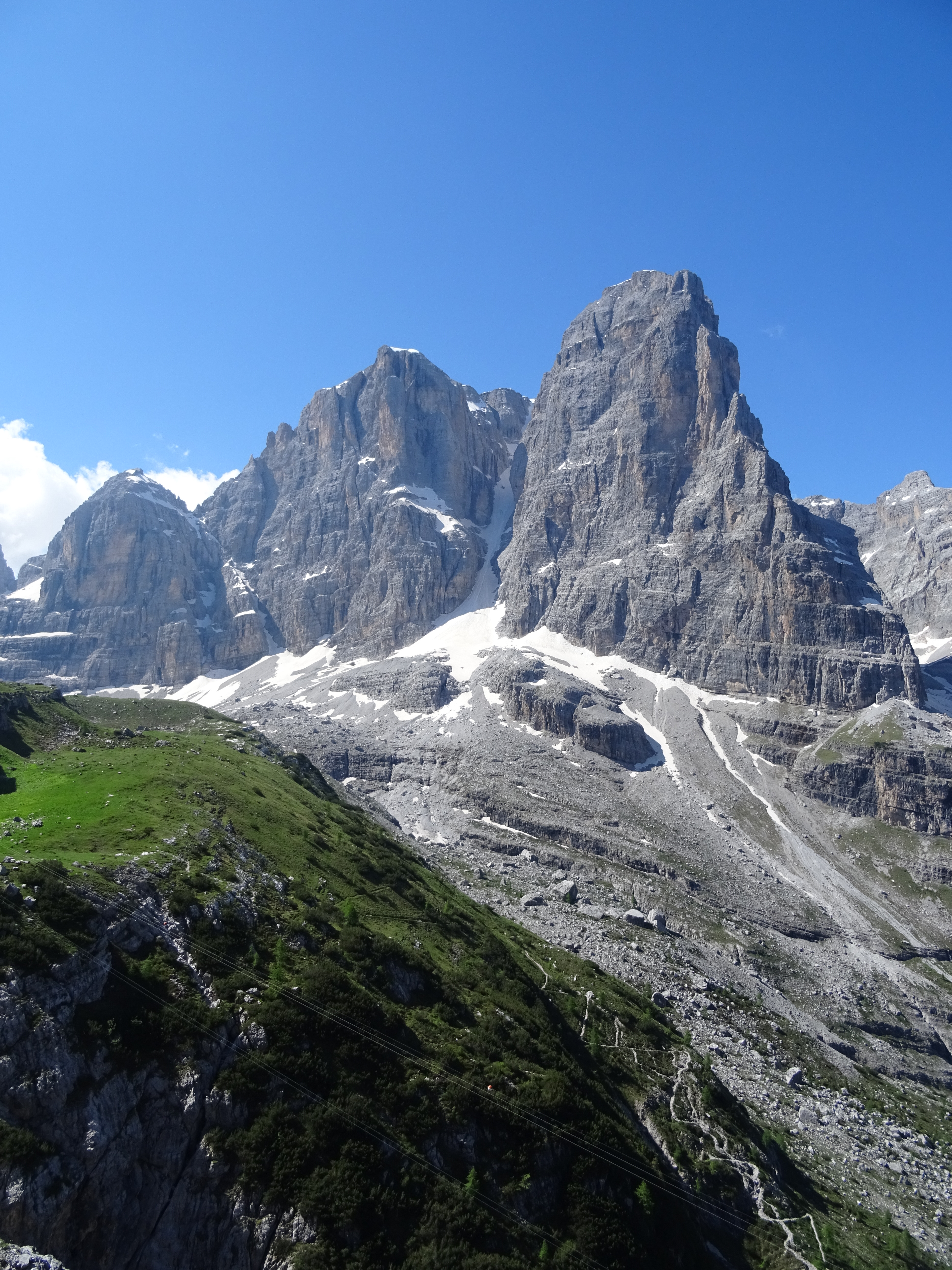 Parco naturale provinciale dell'Adamello-Brenta (Q769604)